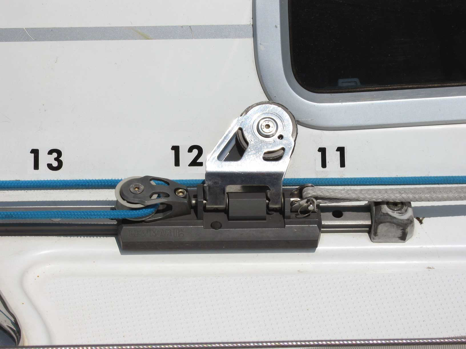 Chariot d'écoute de Foc, Lorient, France